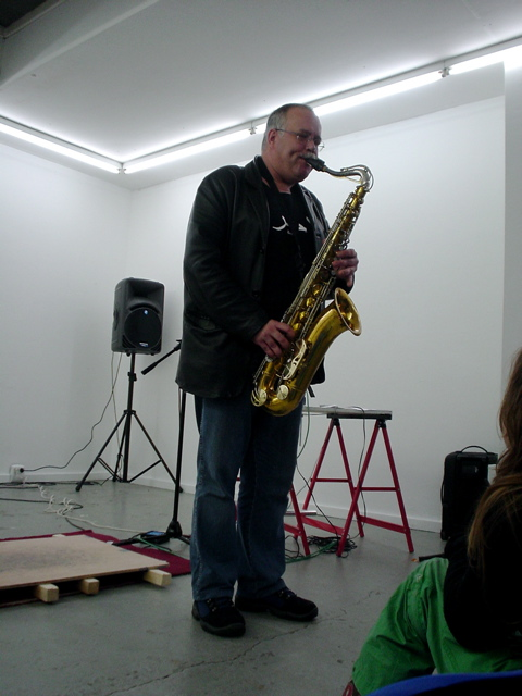 Nederlandse saxofonist Luc Houtkamp